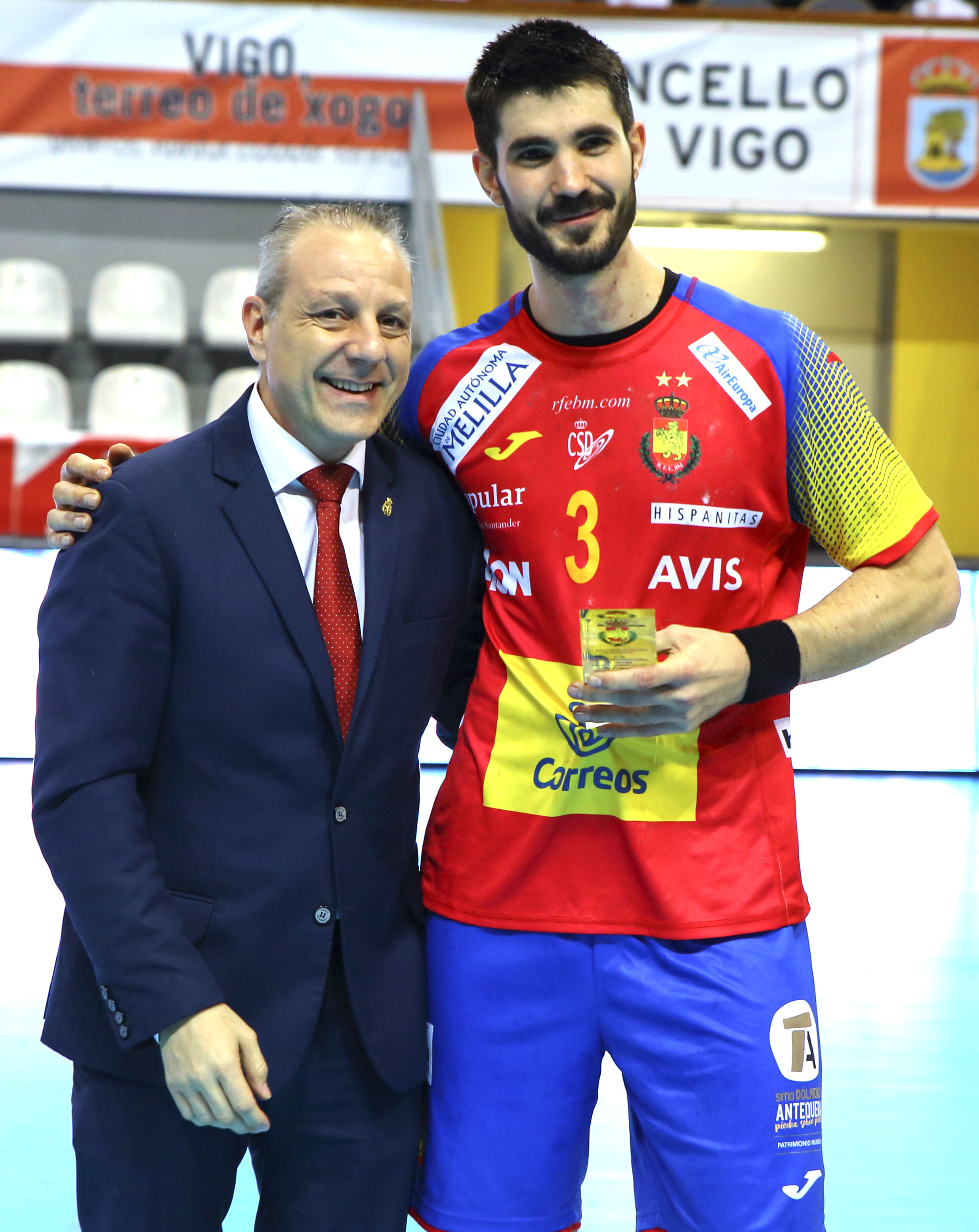 XLIII Torneo Internacional de España, disputado en Pontevedra y Vigo, para el último preparatorio de cara al Europeo, con la convocatorio ya definitiva.